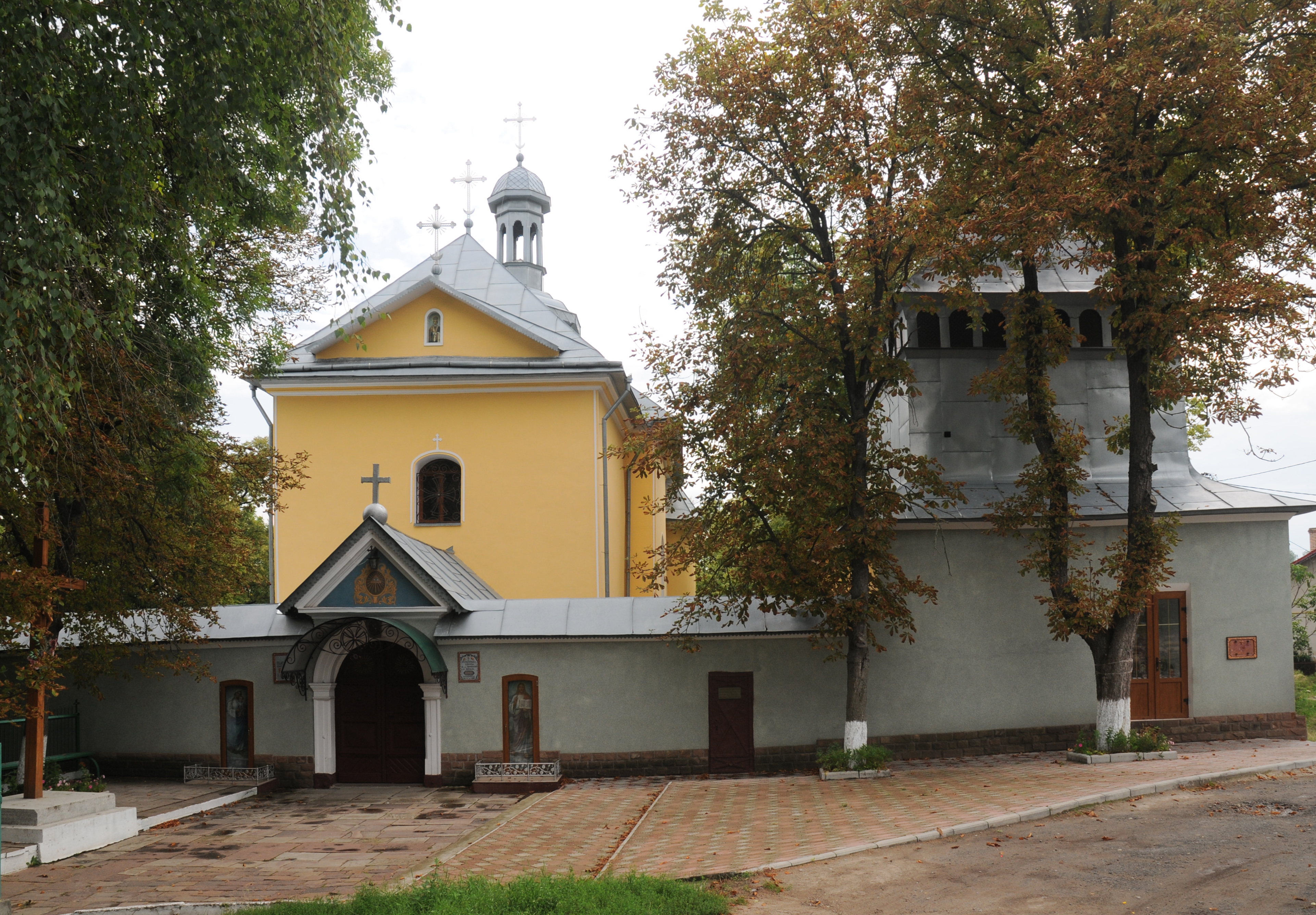 церква св.Миколая із дзвіницею